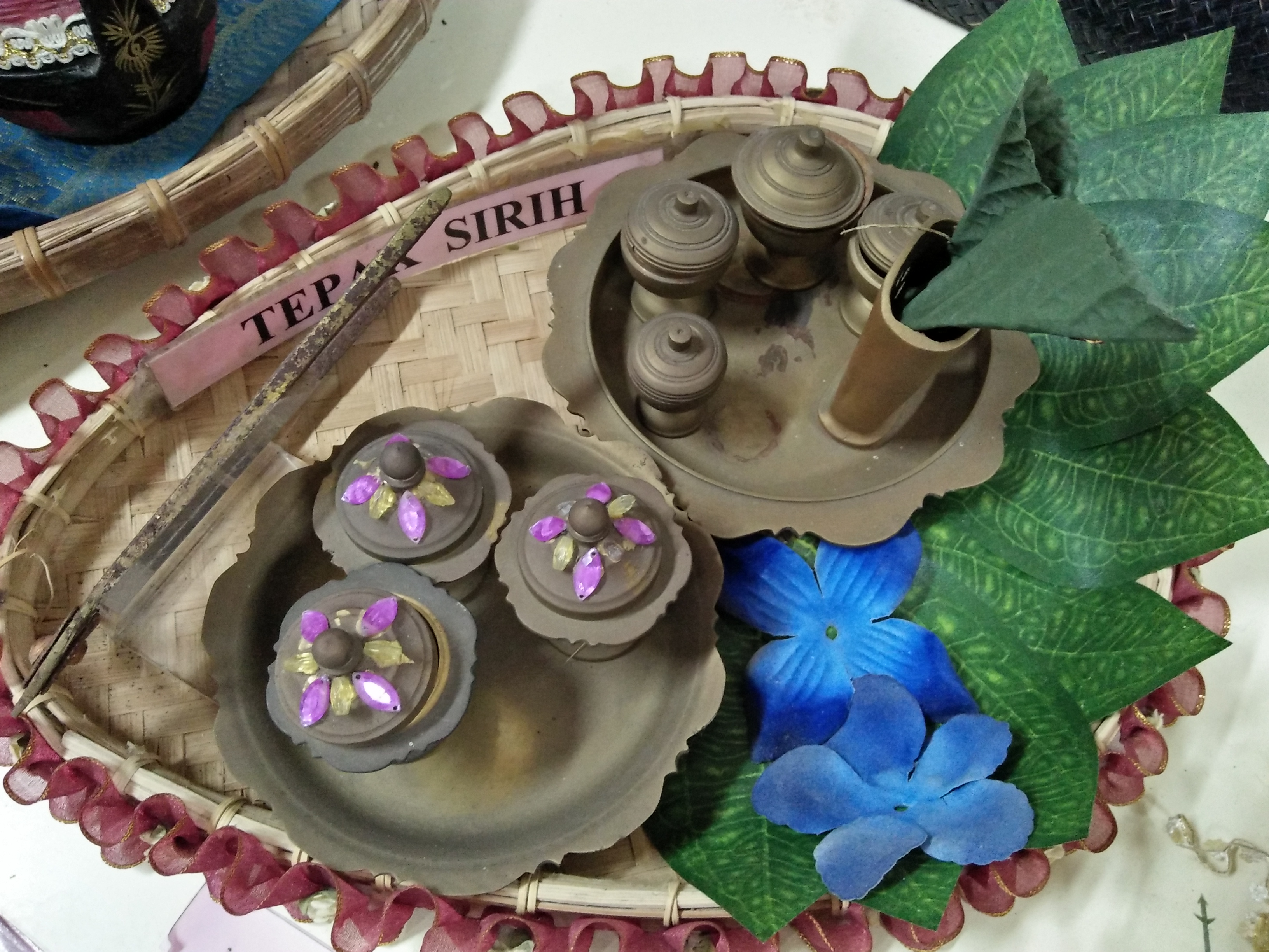 Barang perhiasan yang digunakan untuk tujuan rasmi.